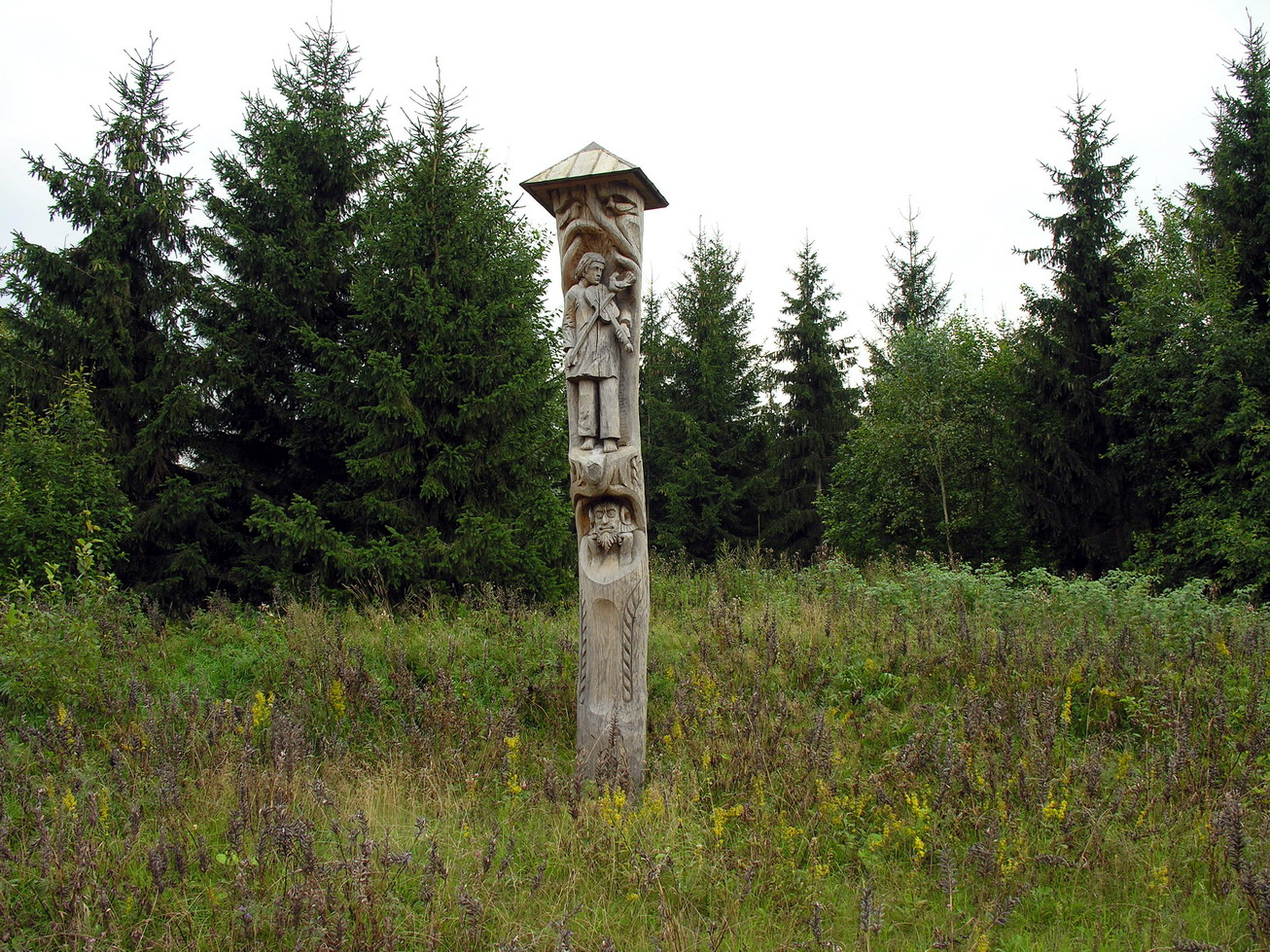 Žemaitėška: bat-smg:Godelē (lt. Godeliai) bat-smg:Žemaitėjės naciuonalėnis parks Puortegrapėje Algirda, 2007-08-23, bat-smg:Žemaitėjė